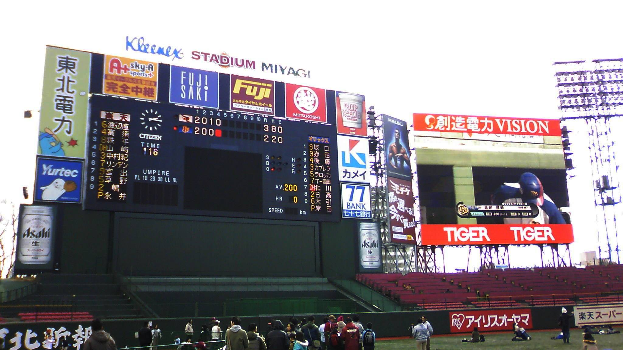 宮城球場（クリネックススタジアム宮城）